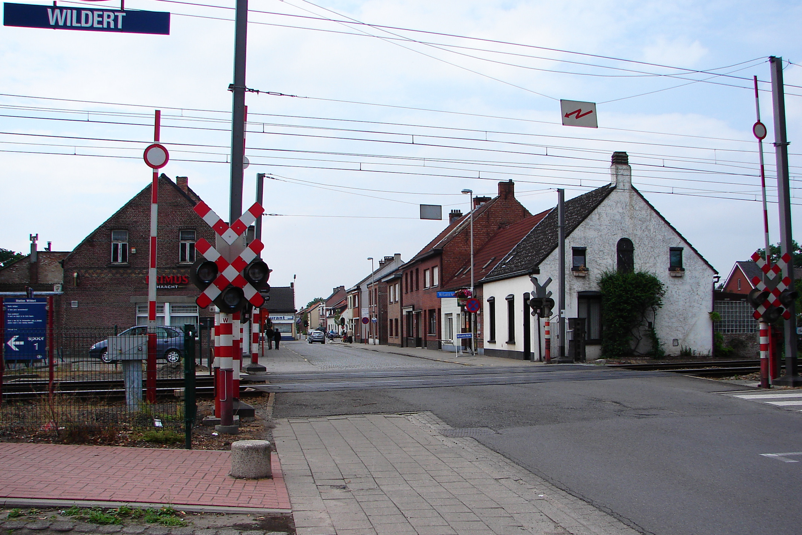 Wildert (Essen municipality), Antwerp Province, Belgium